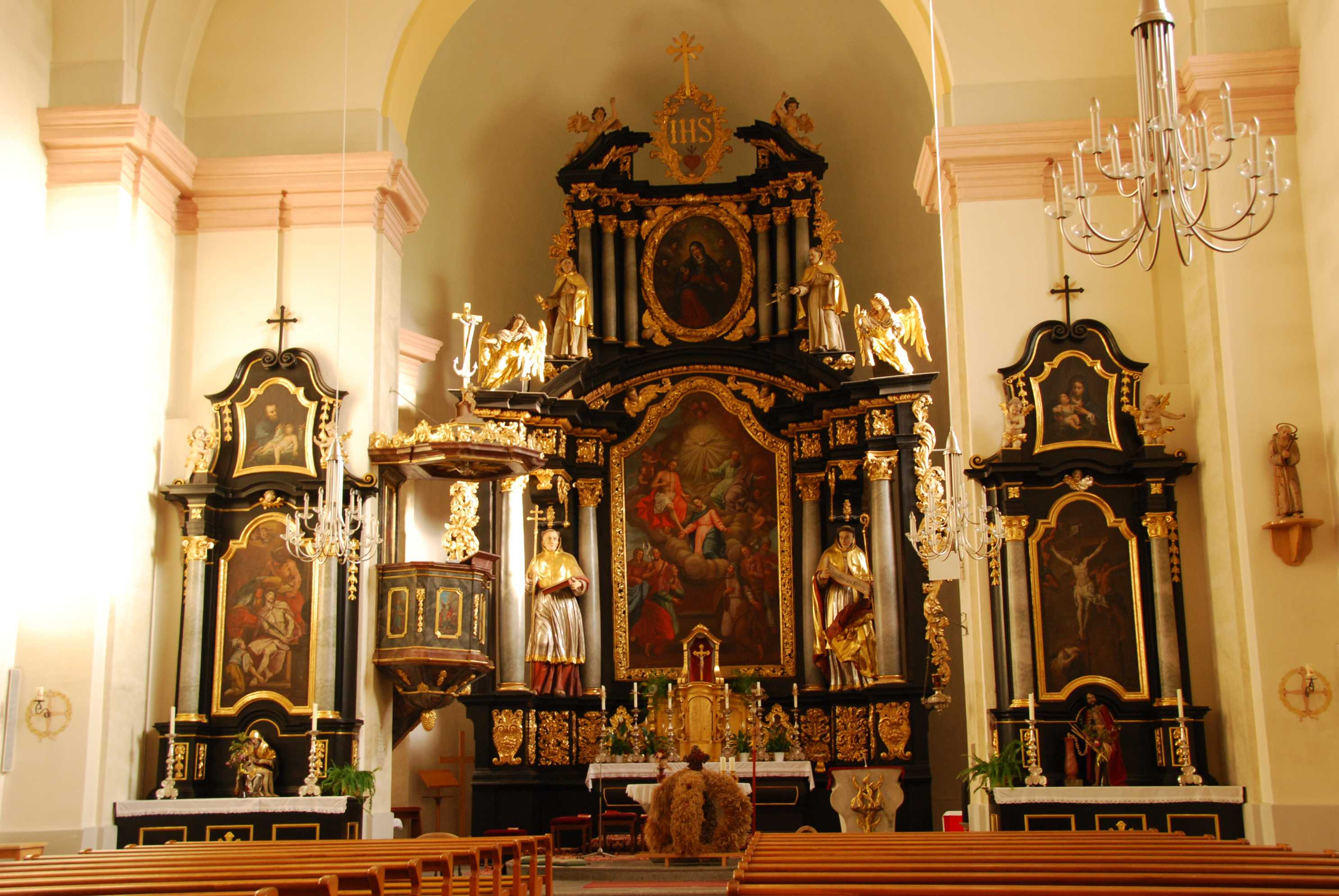 Hl. Dreifaltigkeit, Grainet innen 2009